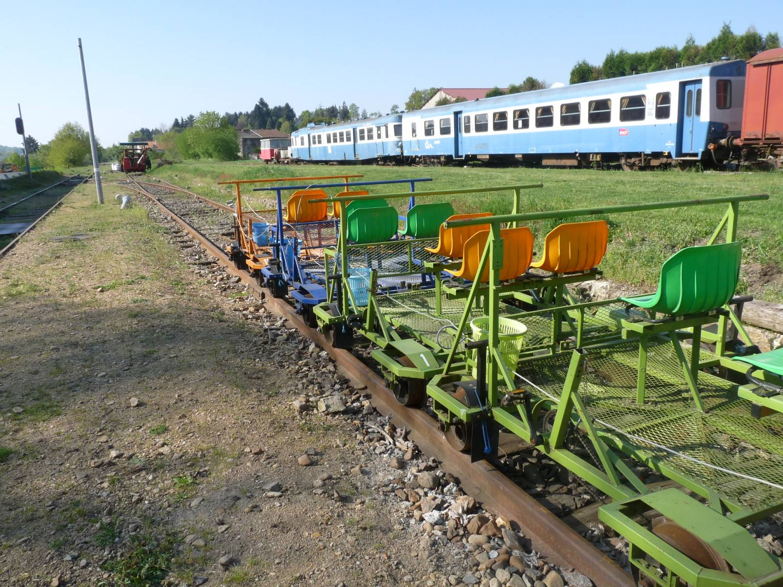 Vélo-rail en gare de Confolens, Charente, France